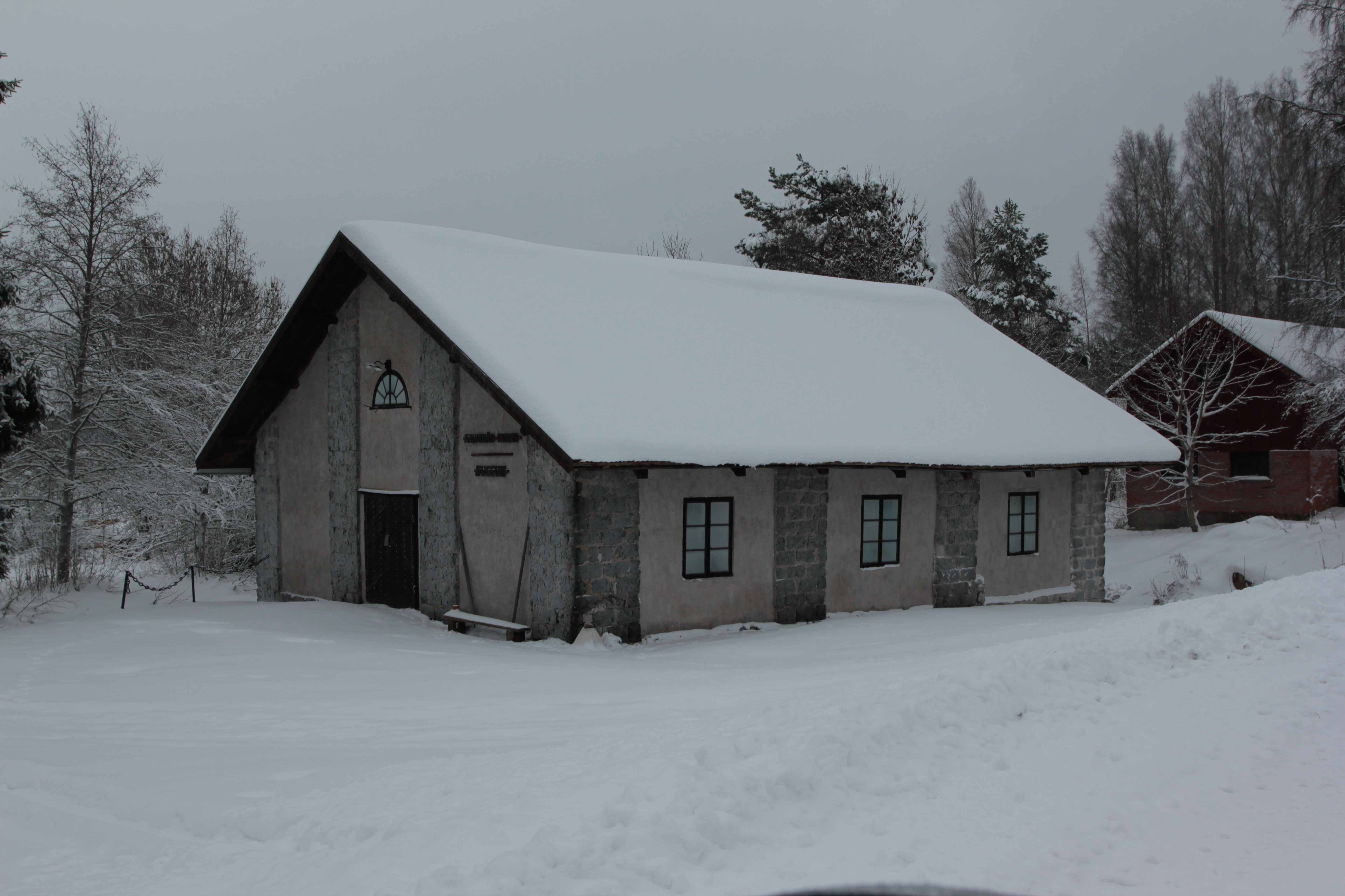 Den gamla kvarnen i Kalvsnäs, numera museum.